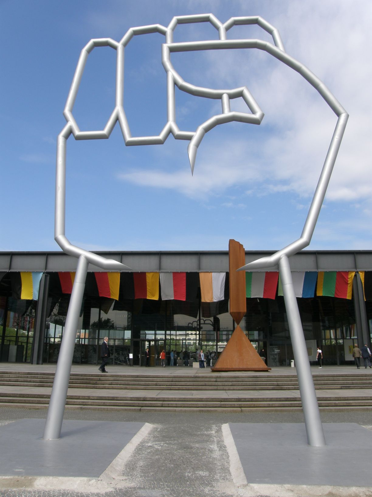 Piotr Uklański: Untitled (Fist). Temporär aufgestellt vor der Neuen Nationalgalerie in Berlin-Tiergarten.